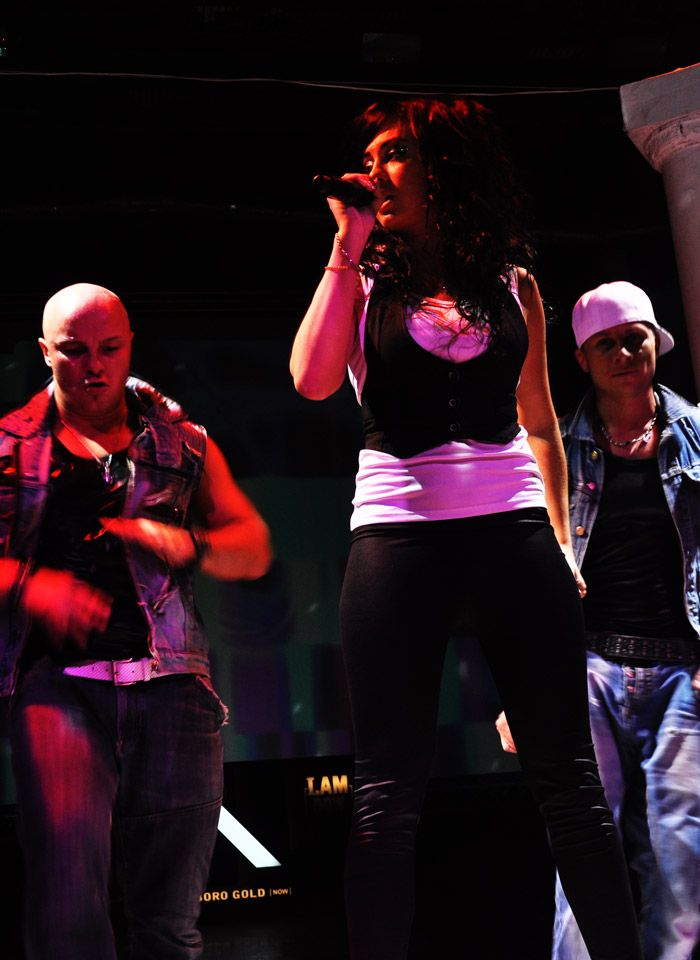 группа Краски с концерта 4 апреля 2012 года во Владивостоке